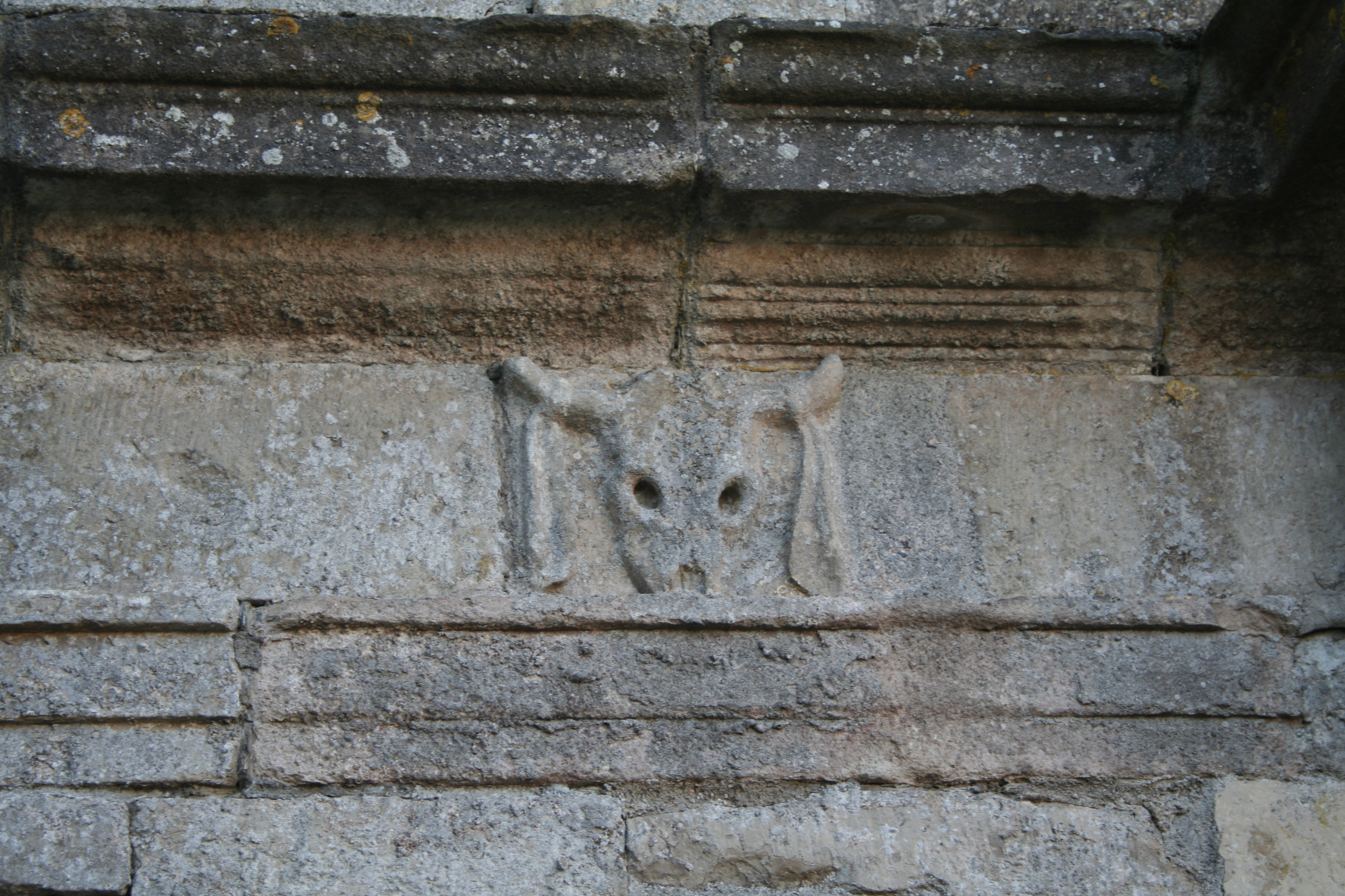 Sévérac-le-Château (Aveyron) - château - bucrane.